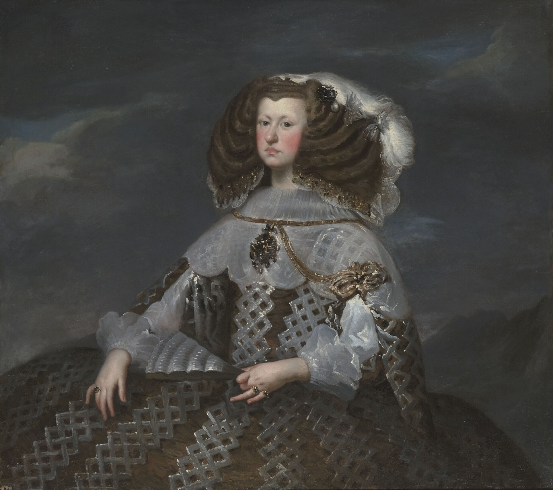 Maria Anna, Archduchess of Austria and Queen of Spain, second wife of King Felipe IV. of Spain, mother of King Carlos II. of Spain Type d'objet tableau Auteur / Exécutant VELASQUEZ Diego Précision auteur Séville, 1599 ; Madrid, 1660 Ecole Espagne Titre MARIE-ANNE D'AUTRICHE, REINE D'ESPAGNE (1635-1696) , DITE AUTREFOIS MARGUERITE D'AUTRICHE, REINE D'ESPAGNE Inscription inscription donnant l'identité du modèle (ancienne) Sujet représenté portrait (Marie-Anne d'Autriche, femme, en buste, de trois-quarts) Lieu de conservation Versailles ; musée national du château et des Trianons Musée de France au sens de la loi n°2002-5 du 4 janvier 2002 renseignements sur le musée Statut juridique propriété de l'Etat ; musée national du Château et des Trianons ; mode d'acquisition inconnu Ancienne appartenance ancien fonds Genèse copie ; oeuvre en rapport Bibliographie SOULIE 1880, n° 3361 ; CONSTANS 1980, n° 4811